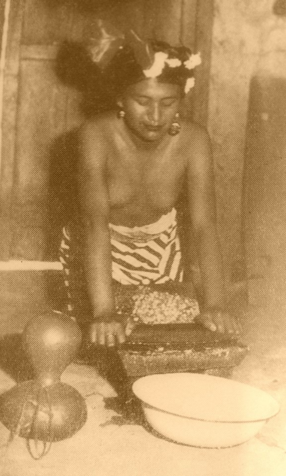 Indigena Popoluca